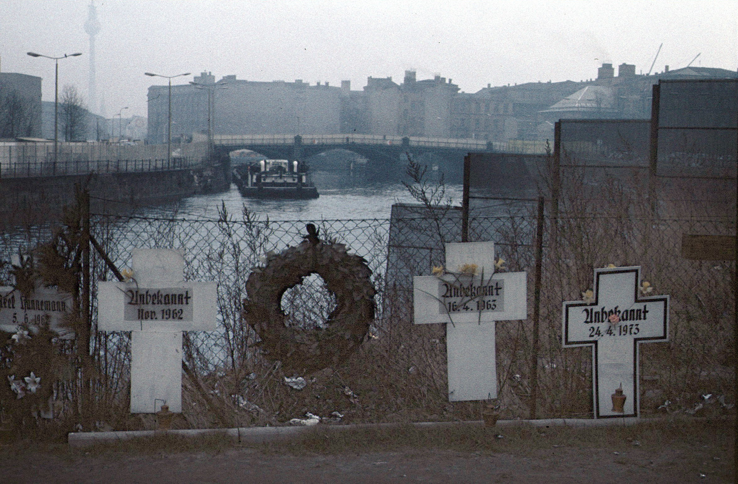 Berlin Januar 1974, Weiße Kreuze im Gedenken an Mauertote beim Berliner Reichstagsgebäude, am linken Bildrand das Kreuz für Axel Hannemann